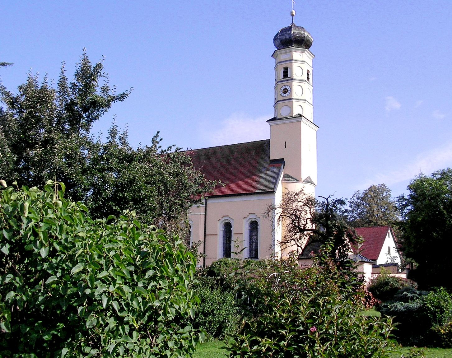 Katholische Filialkirche St. Leonhard in Roßbach (Odelzhausen), Apsis romanisch, sonst um 1680.